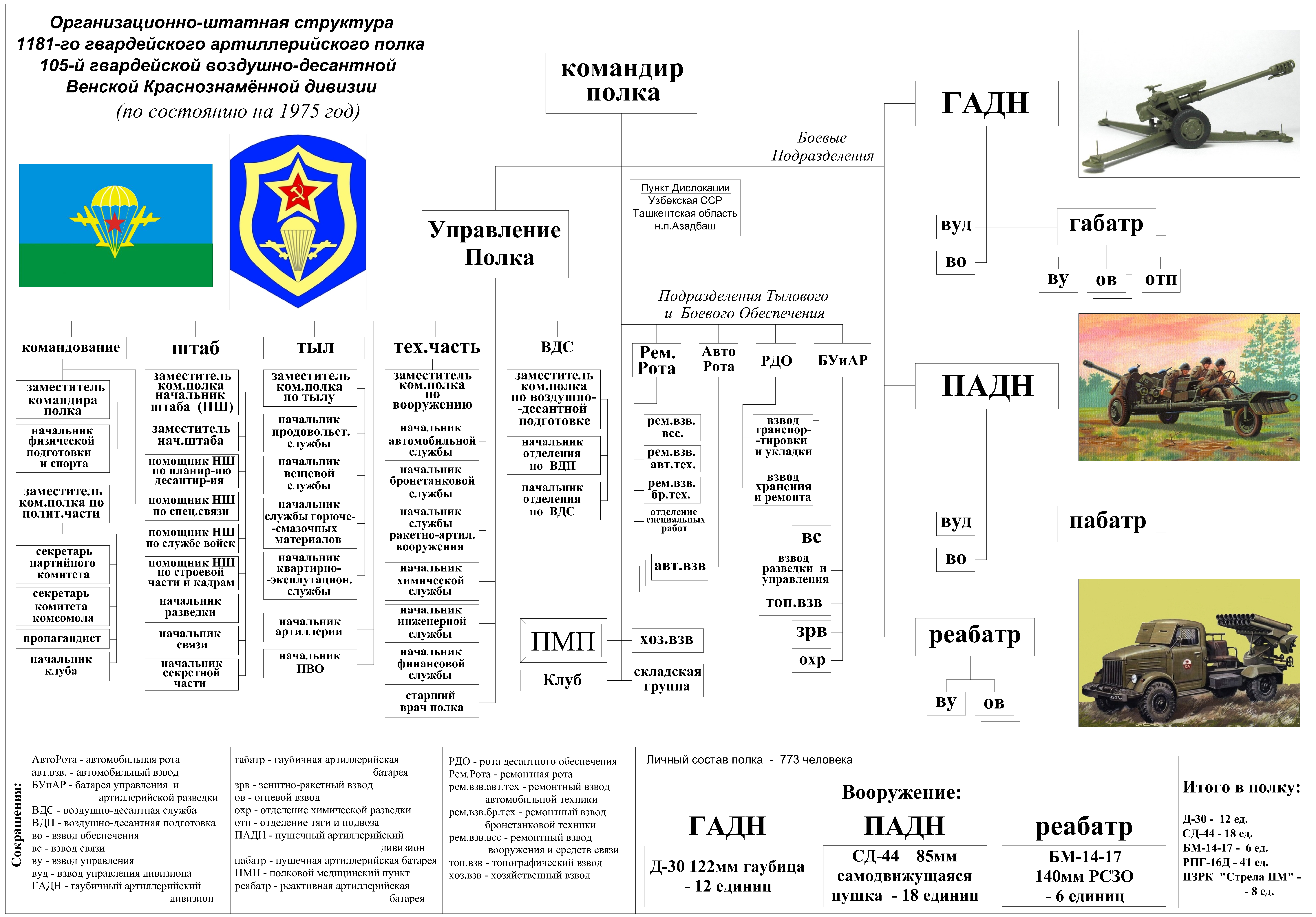 Организационно-штатная структура 1181-го гвардейского артиллерийского полка 105-й гвардейской воздушно-десантной Венской Краснознамённой дивизии на 1975 год.